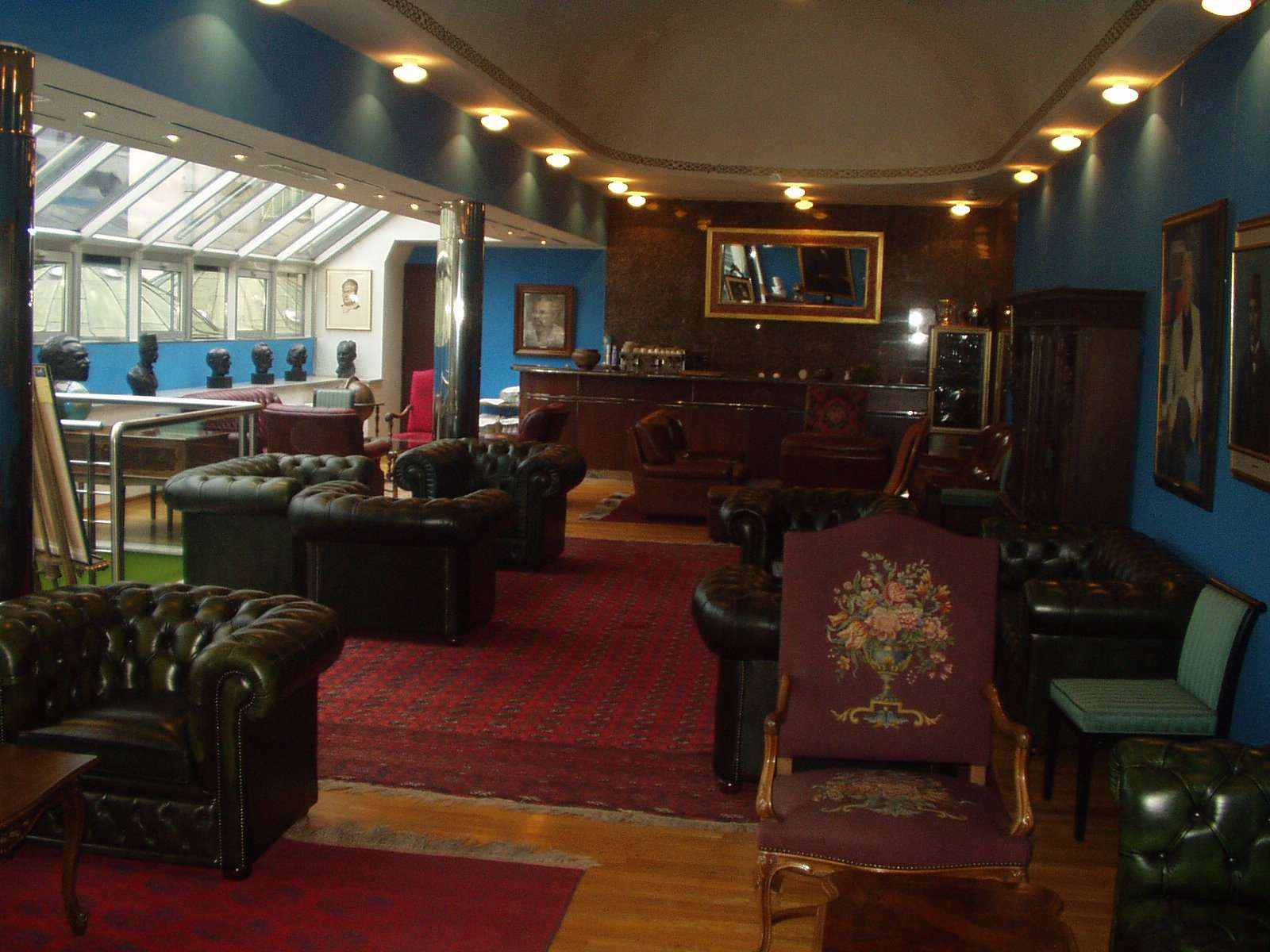 Salon 2